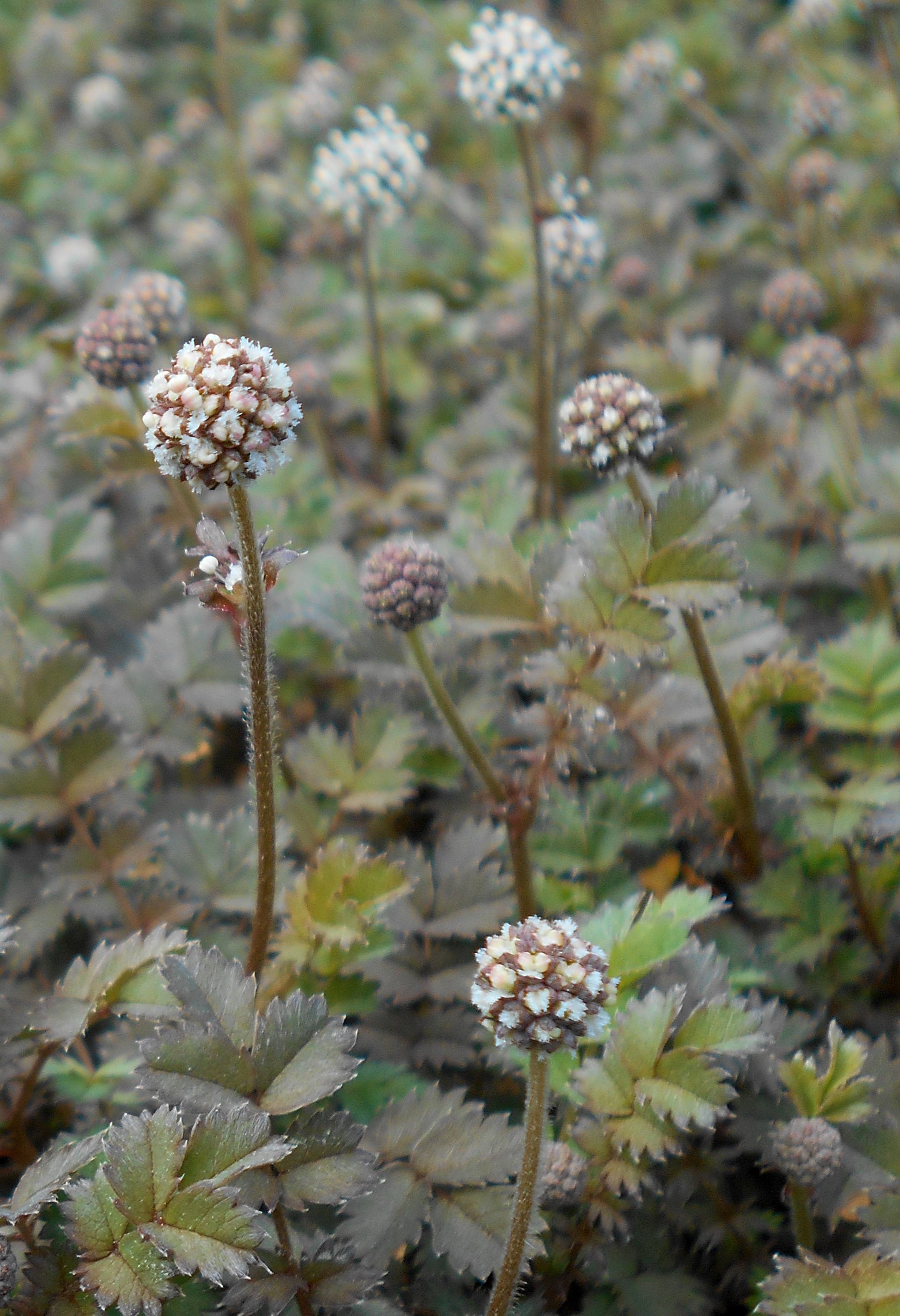 Acena drobnolistna (Acaena microphylla), Botanischer Garten Berlin.